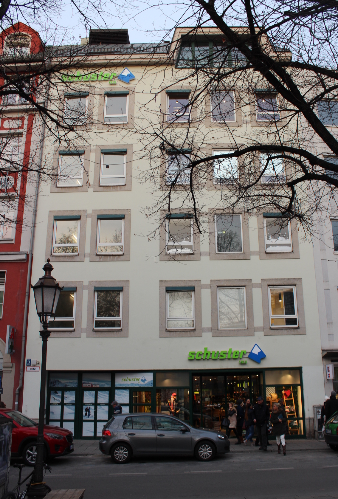 Sporthaus Schuster, München (Gebäude und Eingang am Rindermarkt)